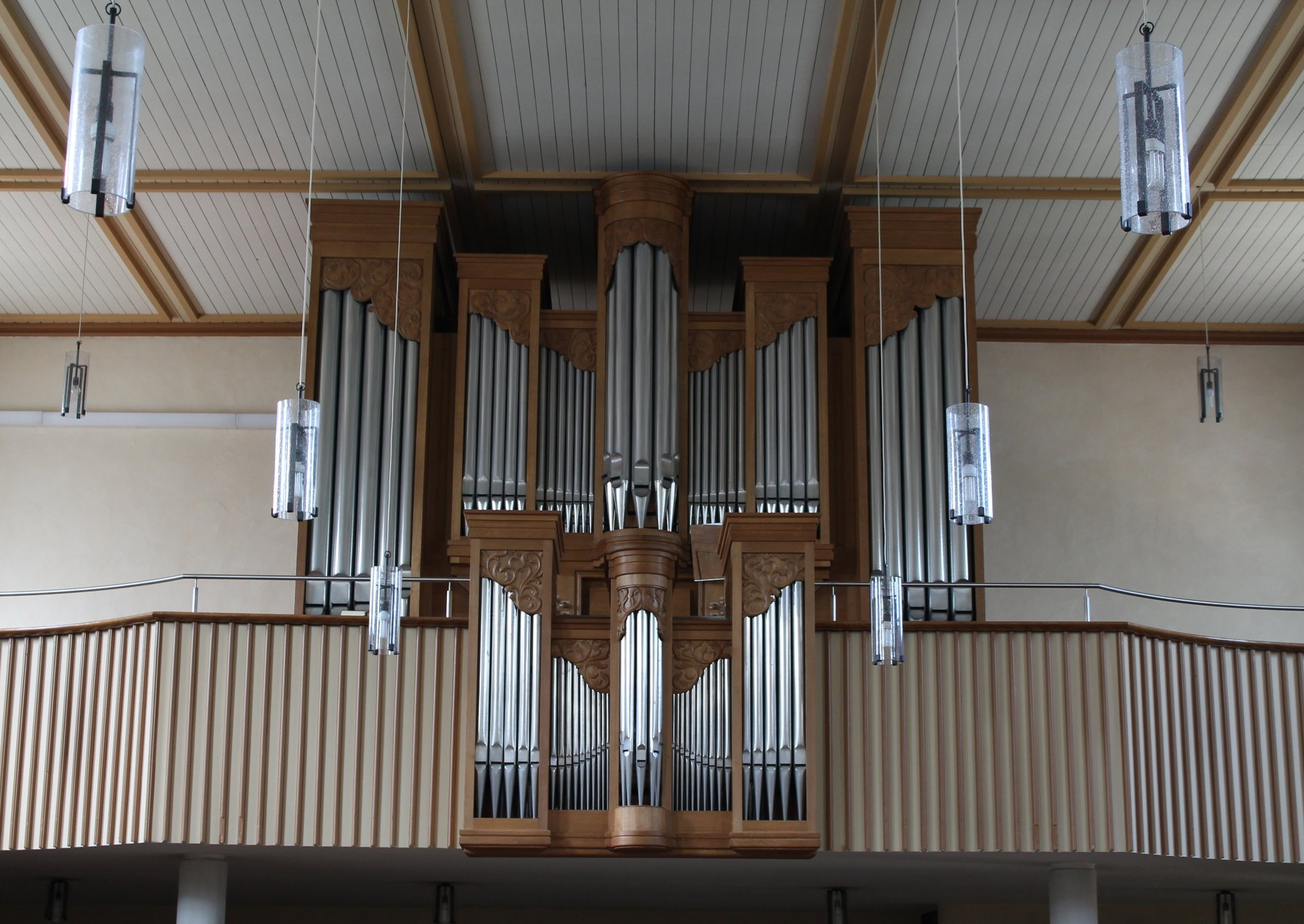 Orgel von St. Michael in Poing (1987, Muhleisen (Straßburg), III/43